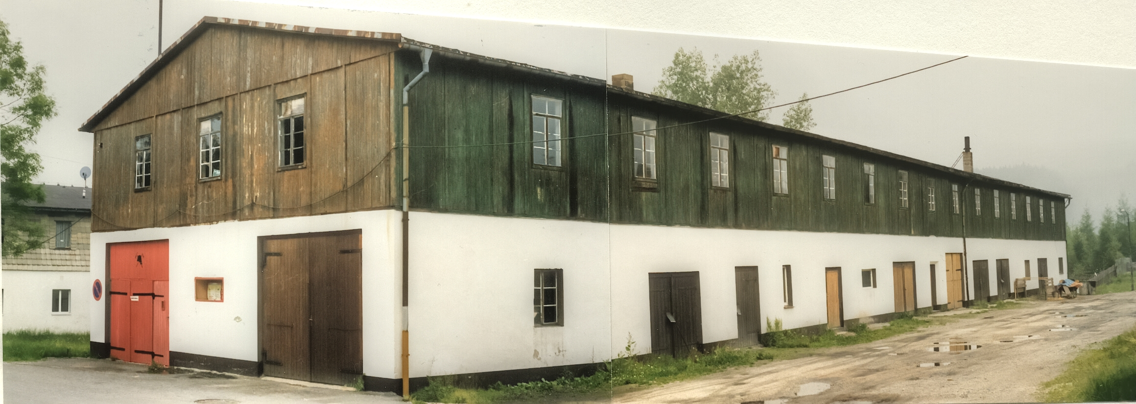 Ein ehemaliges Wismut-Gebäude des Bergbau-Objekts 08 in Neuoberhaus, Johanngeorgenstadt, das später als Feuerwehr und Garagengebäude der Betriebsschule genutzt wurde. Aufnahme entstand 1991.